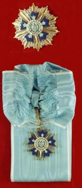 16.11.1987 Orden für Bundespräsident Richard von Weizsäcker, verliehen anlässlich des Staatsbesuches im März 1987 im Guatemala.